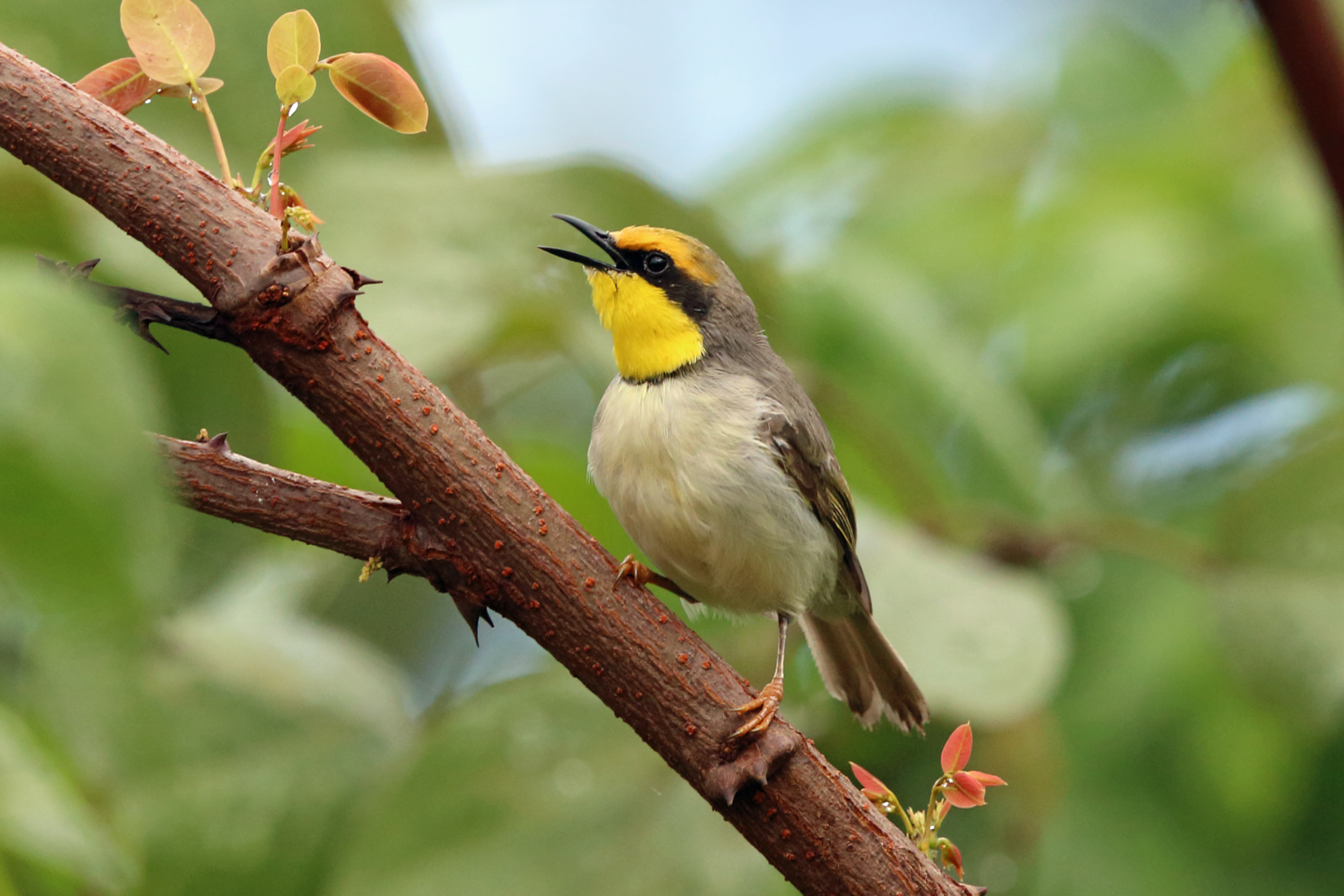 Black-necked Eremomela, Sakania, DRC